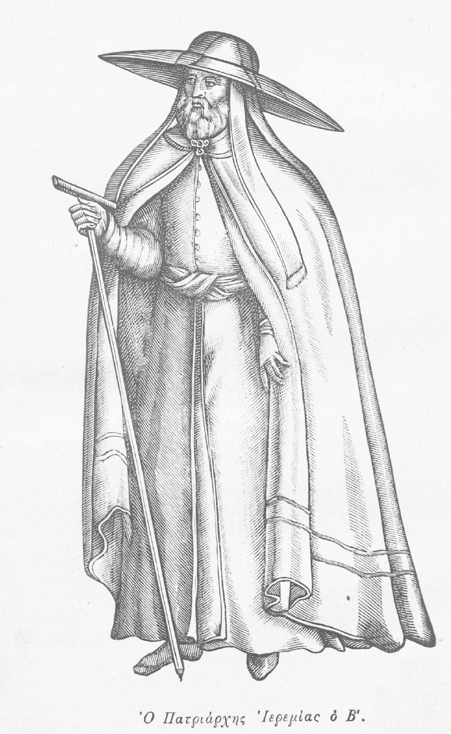 griechischer Bischof